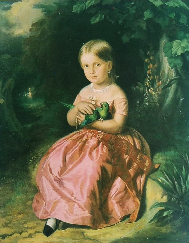 Princesa D. Leopoldina de Bragança (criança), filha de D. Pedro II do Brasil.